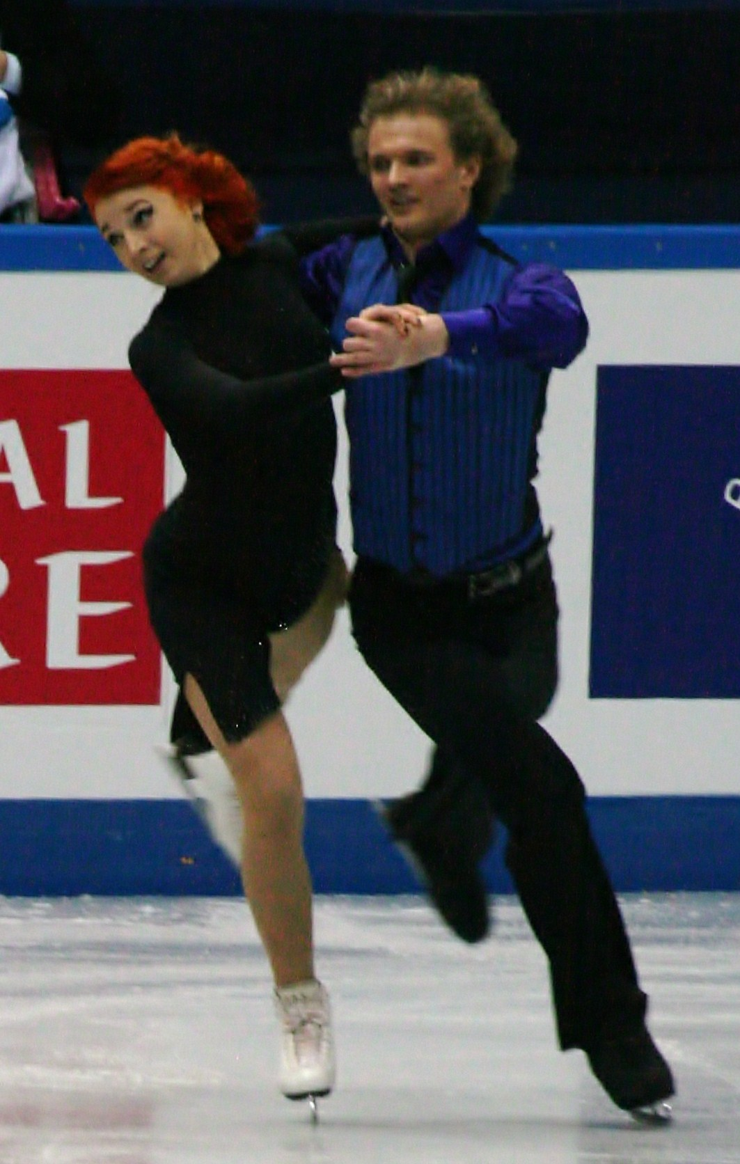 Евгения Косыгина и Николай Морошкин (Россия) на финале Гран-при среди юниоров 2012-2013. Короткий танец.